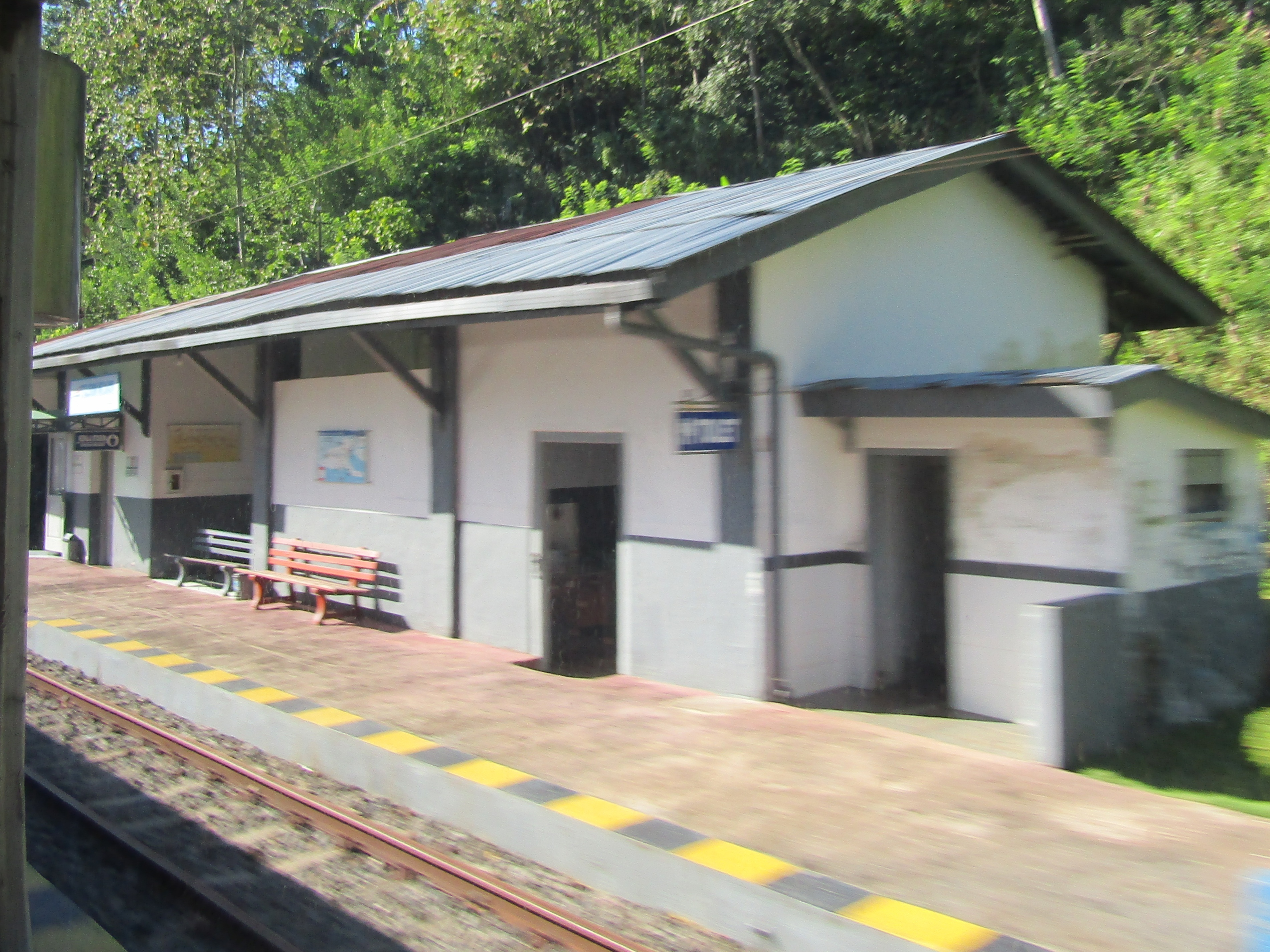 Stasiun Mrawan, 2019